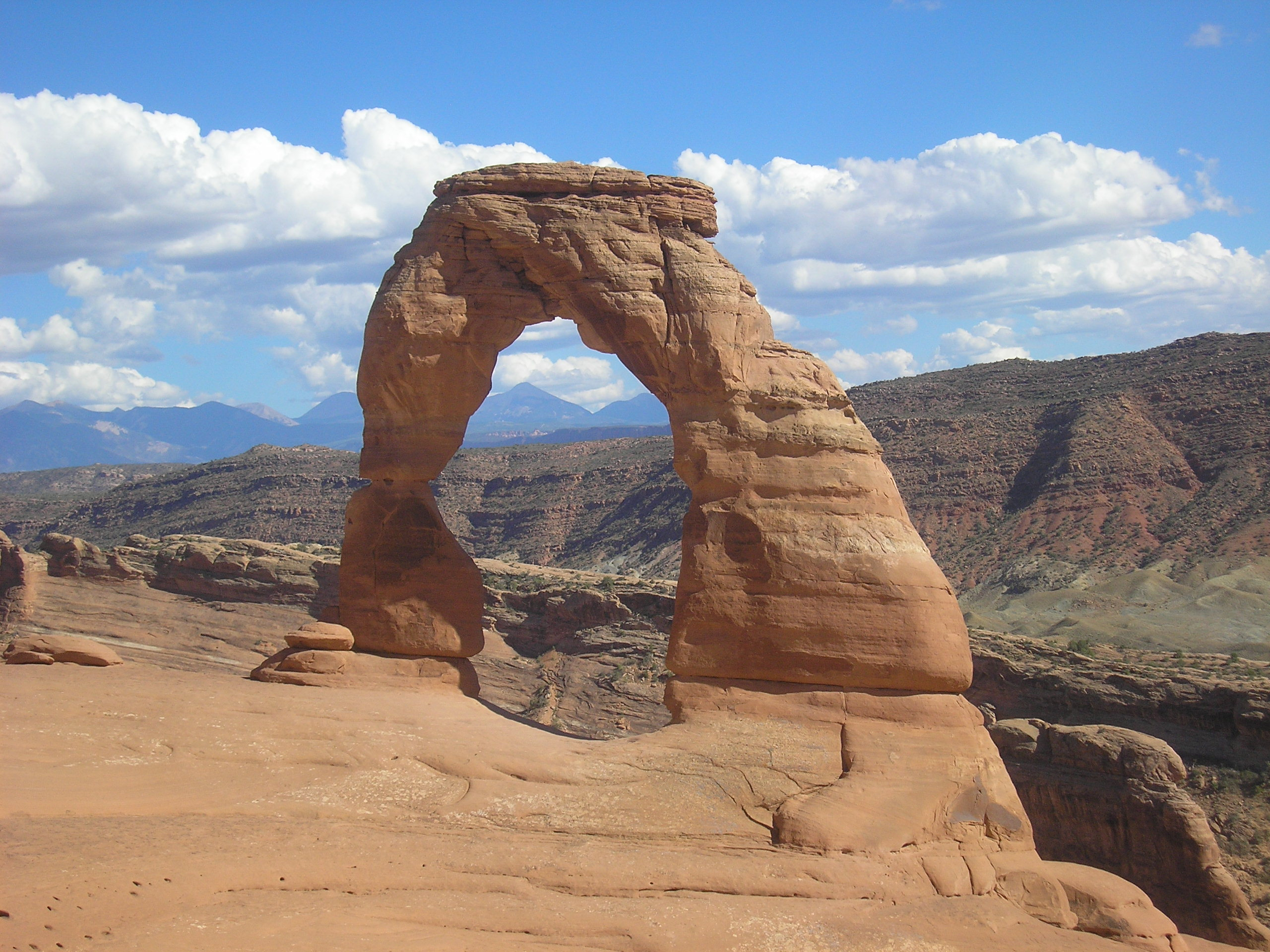 Delicate Arch im Arches-Nationalpark in Utah